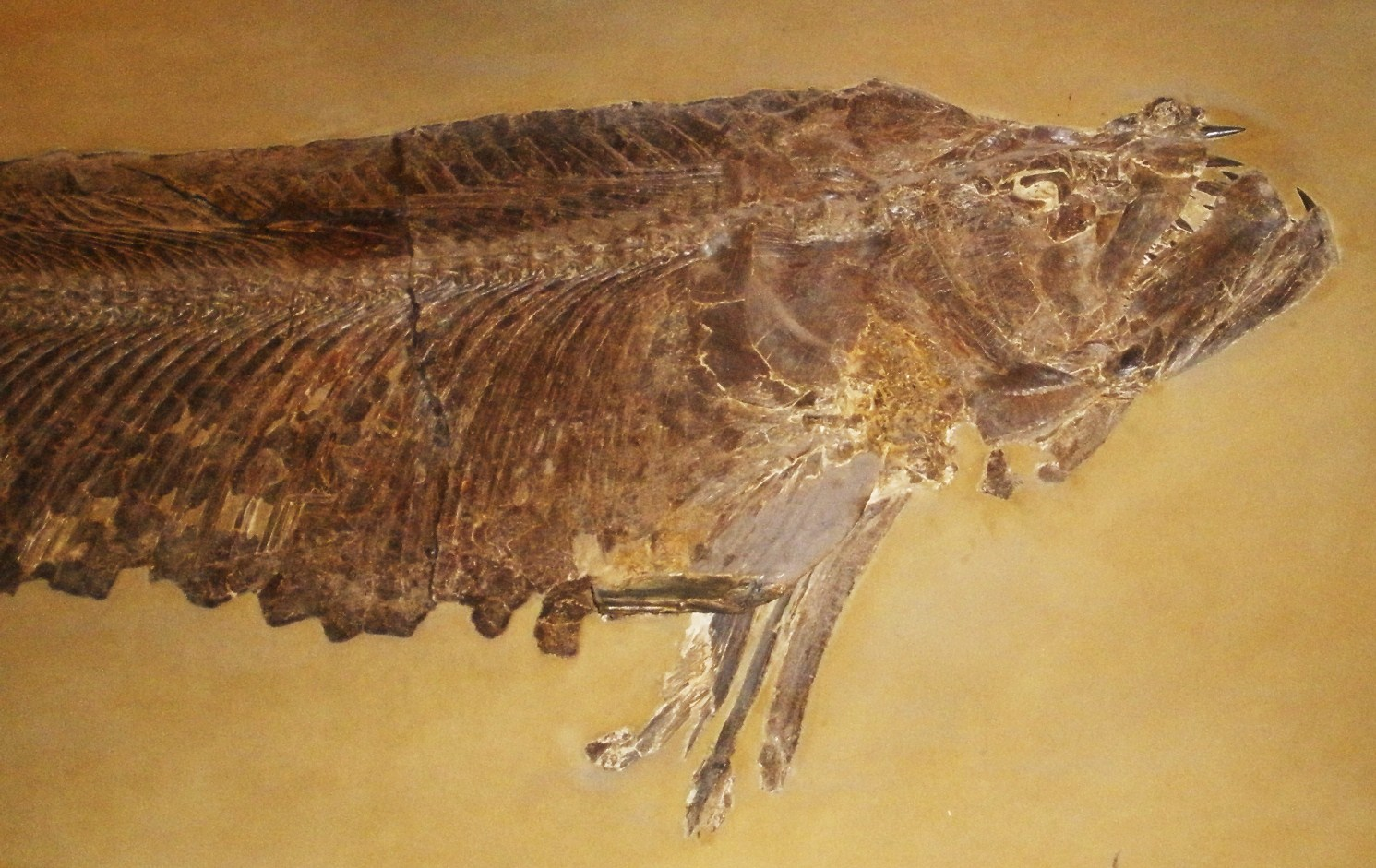 Fossil of Xiphactinus, an extinct fish- Took the photo at Senckenberg Museum of Frankfurt